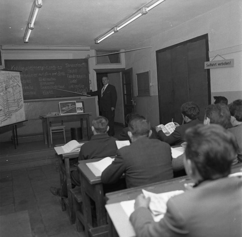 Italienische Gastarbeiter (Bergleute) in Walsum beim Unterricht